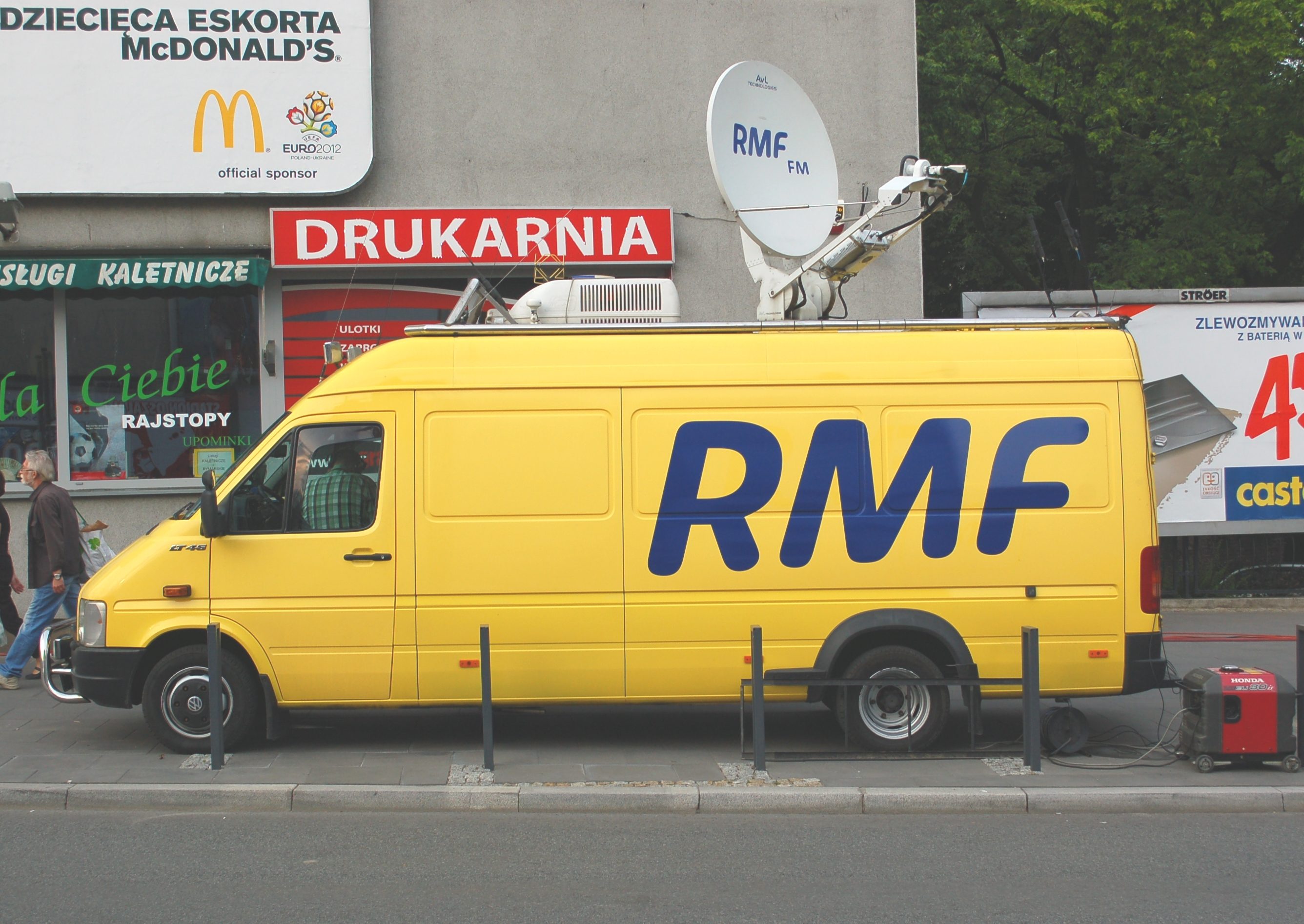 Broadcasting van at UEFA Euro 2012